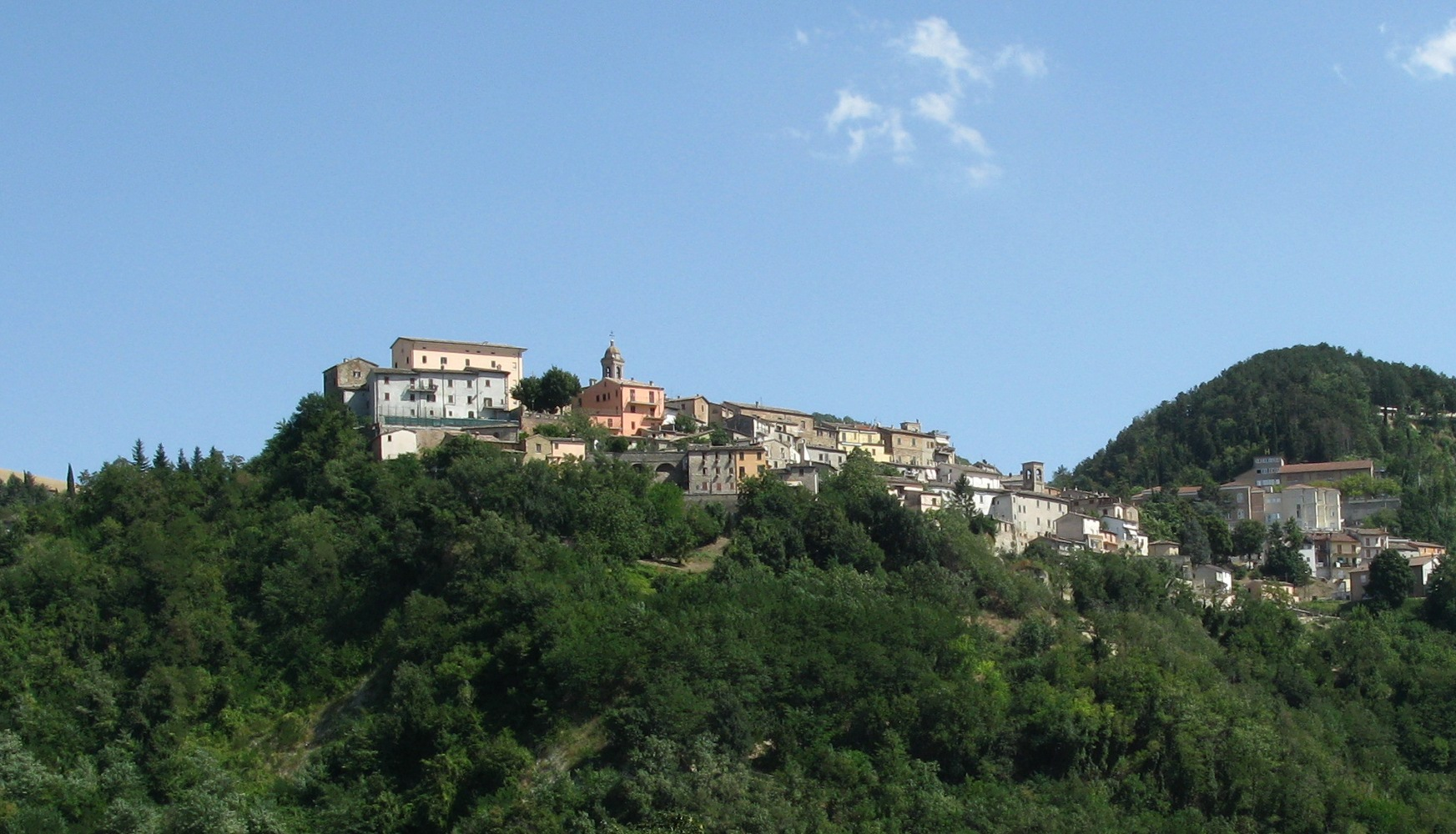 Panorama di Sassocorvaro.